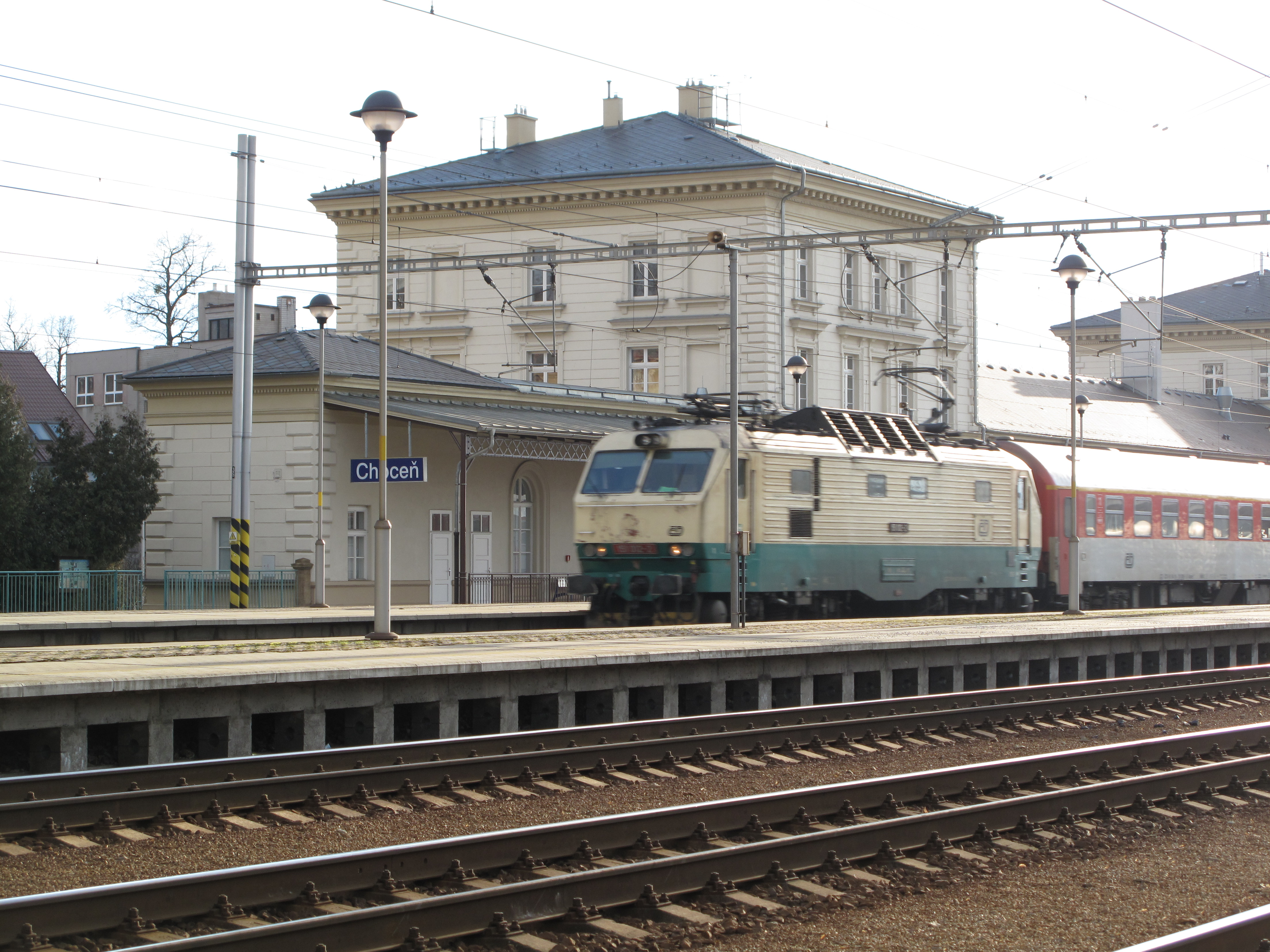 Vlak v Chocni